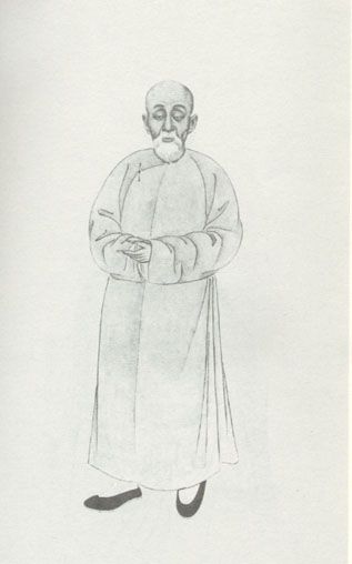 李文田，清朝學者。Li Wentian